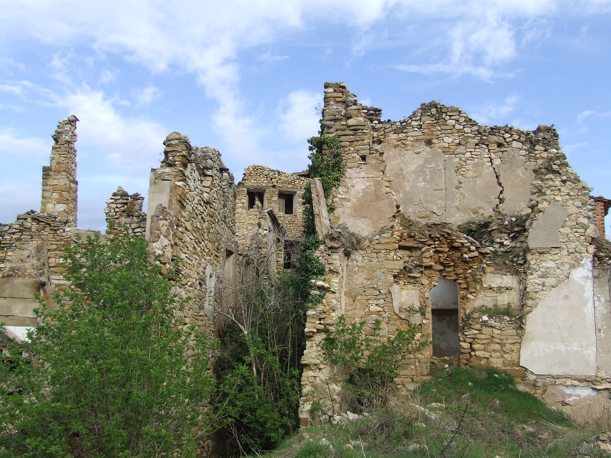 Estat en què es troba una bona part del poble d'Alsamora (Sant Esteve de la Sarga, Pallars Jussà)